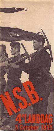 NSB, 4e Landdag 5 october 1935.